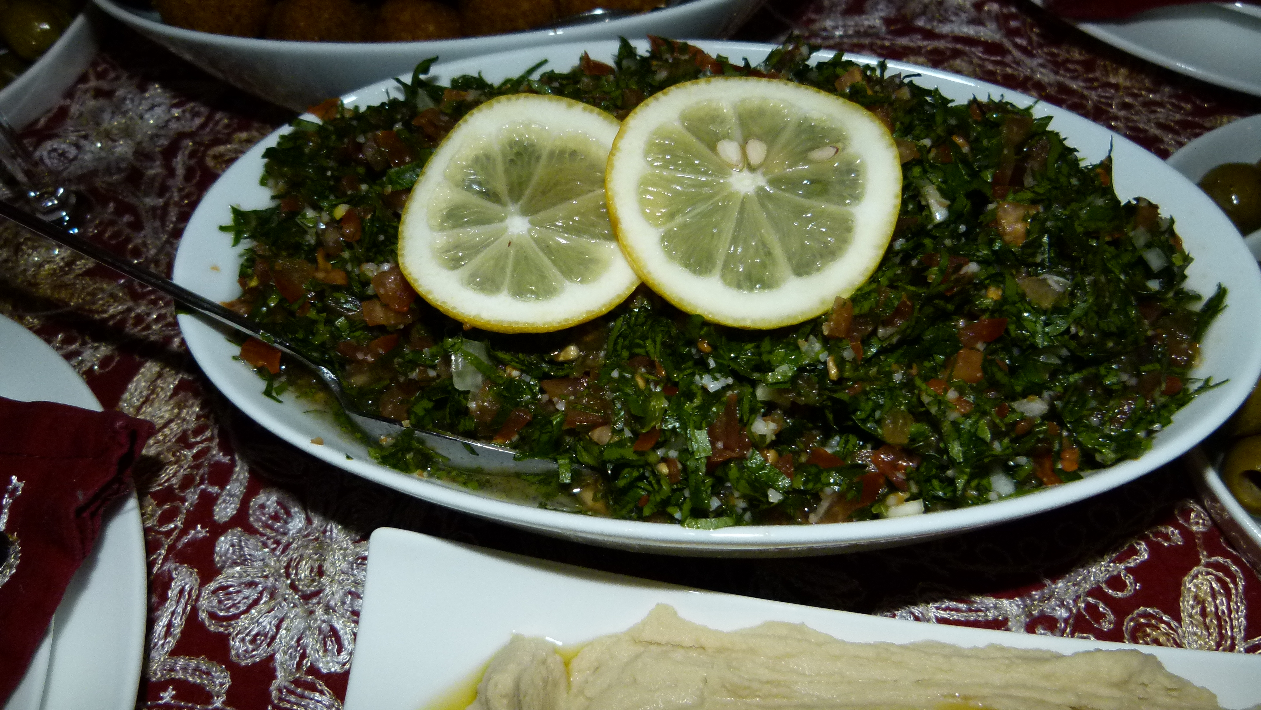 Salat Taboulé